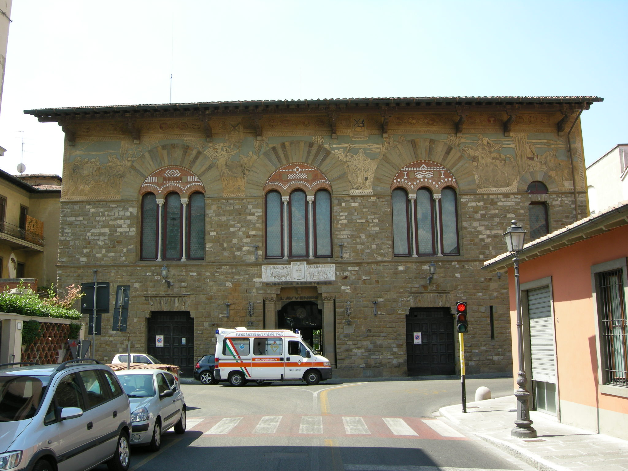 Palazzo della pubblica assistenza (prato), esterno